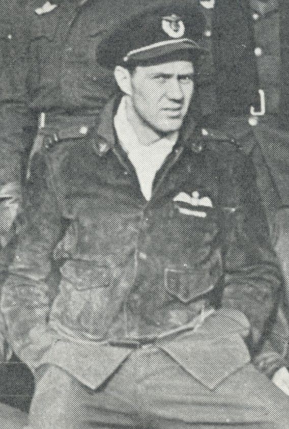 Danske Kaj Birksted var skvadronsjef i 331 (Norwegian) Squadron i november 1942, da bildet ble tatt.